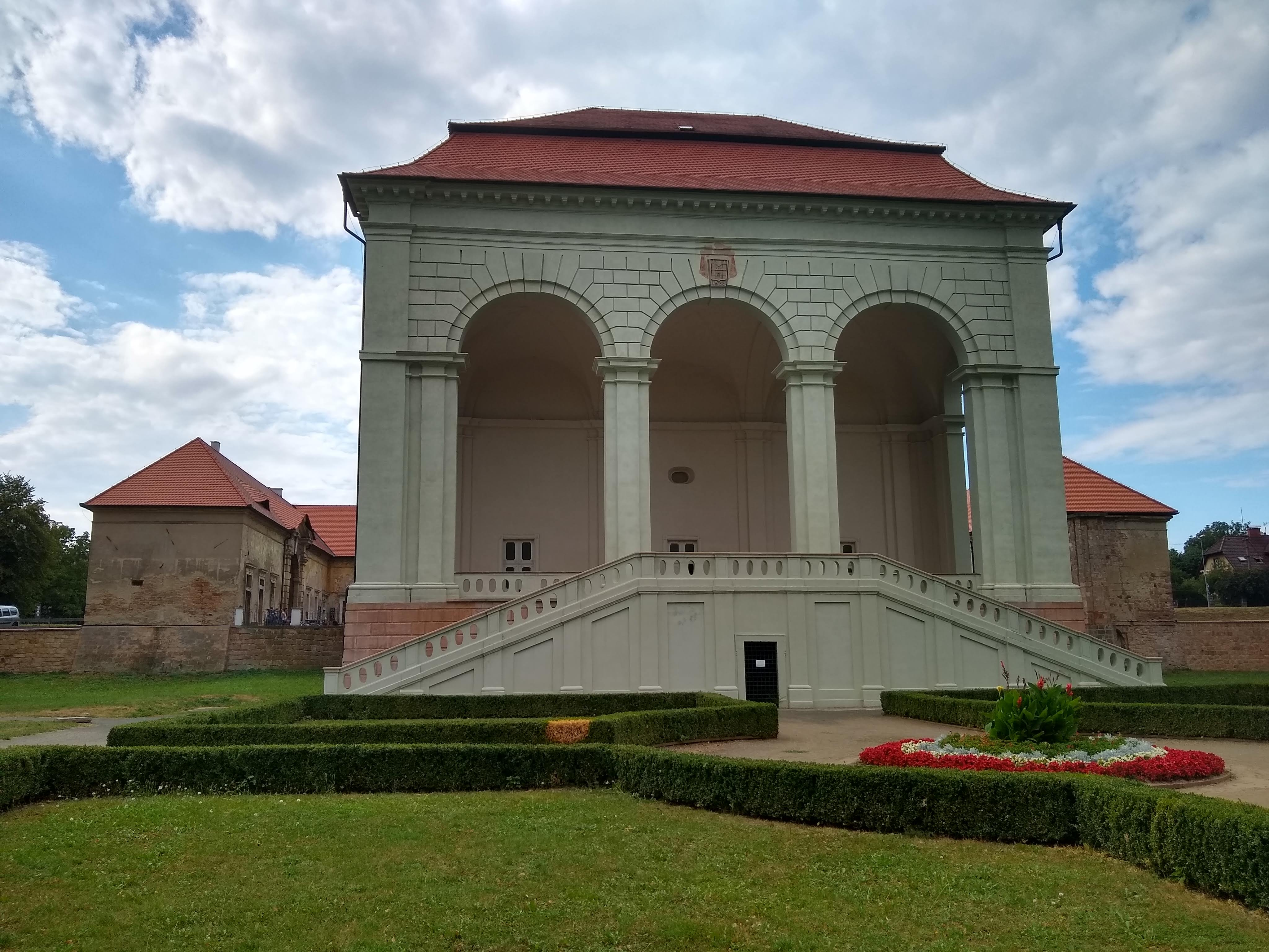 Valdštejnská lodžie v Jičíně s novou zelenou fasádou